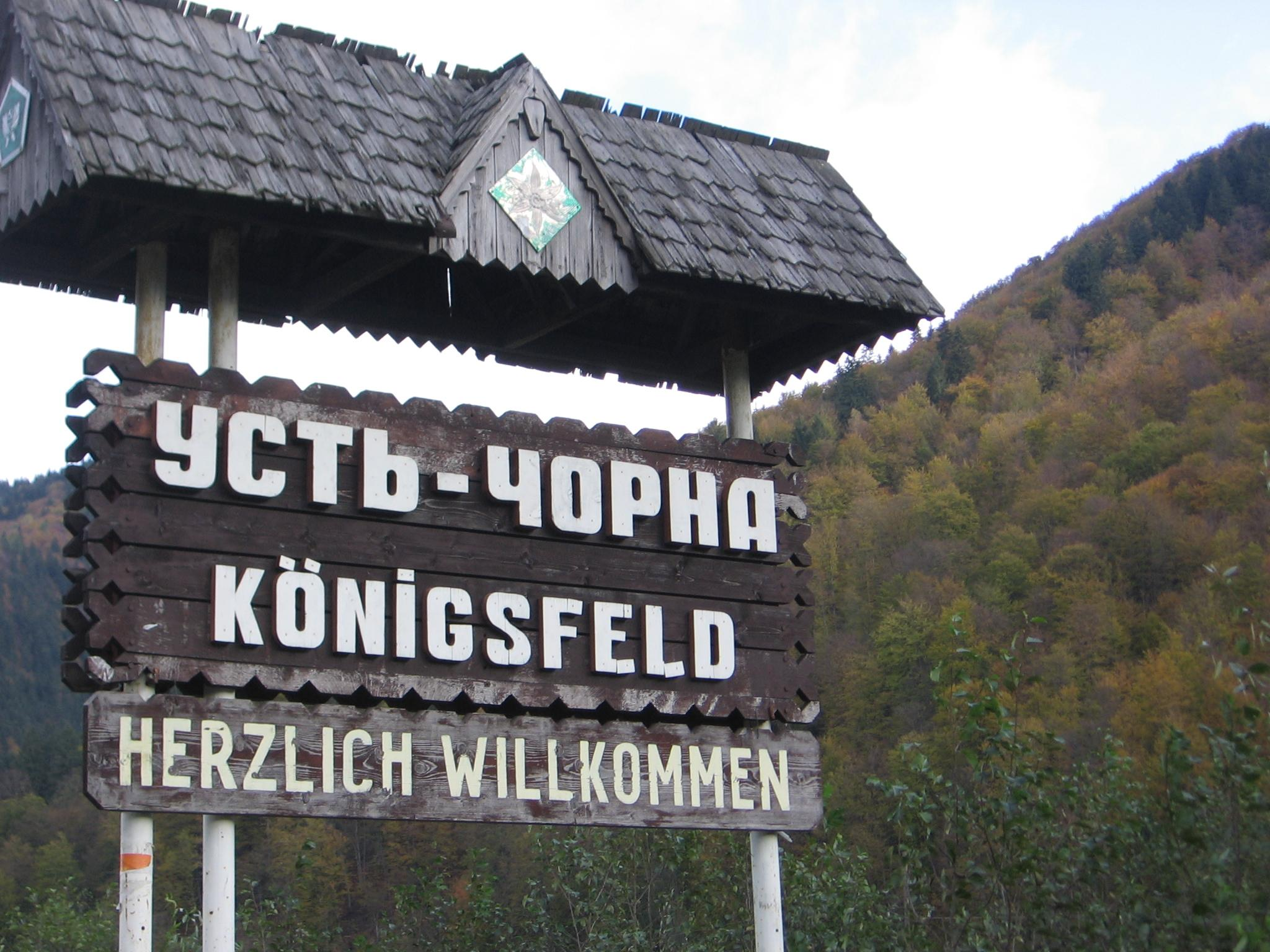 Усть-Чорна